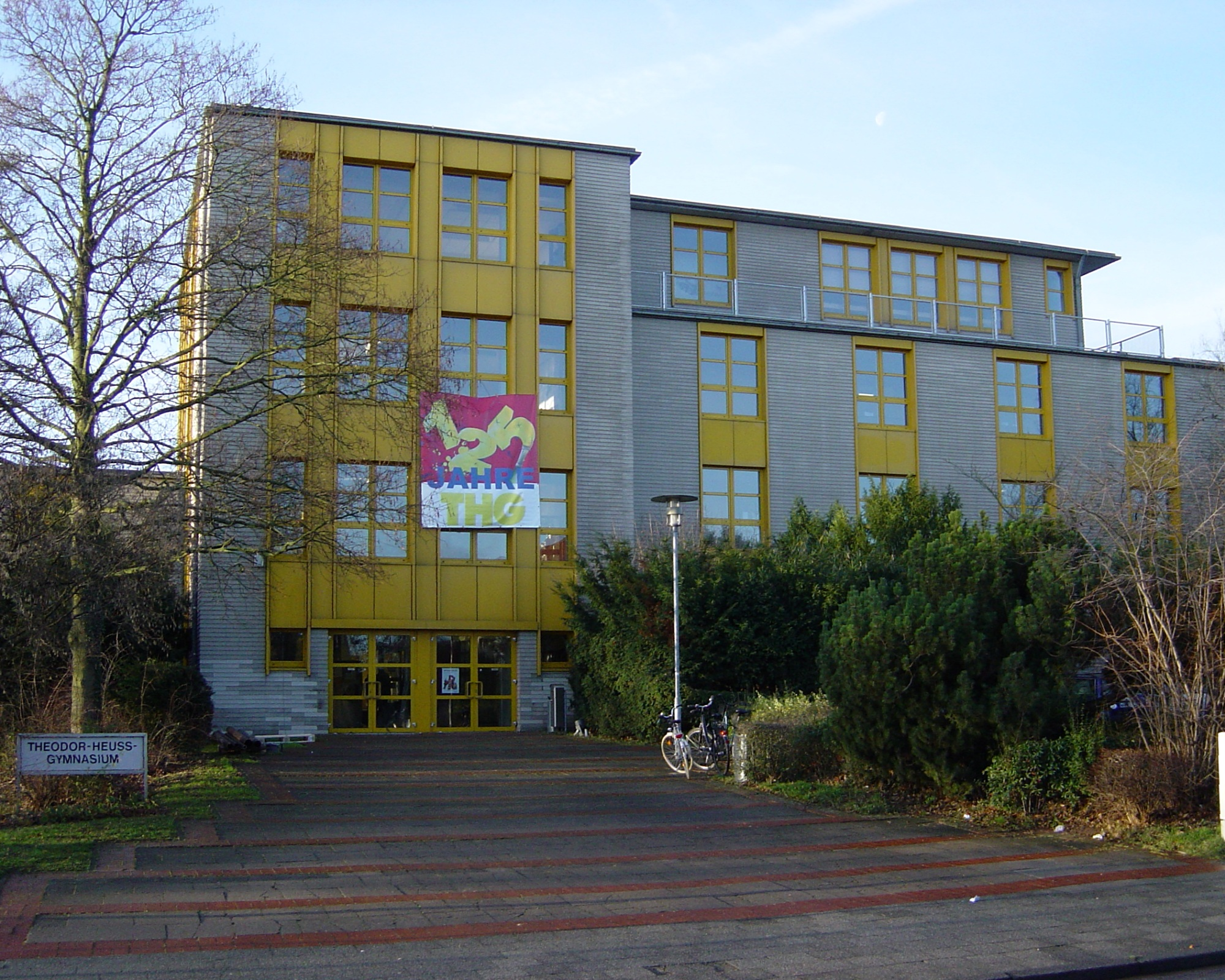 Theodor-Heuss-Gymnasium Wolfenbüttel, Hauptgebäude